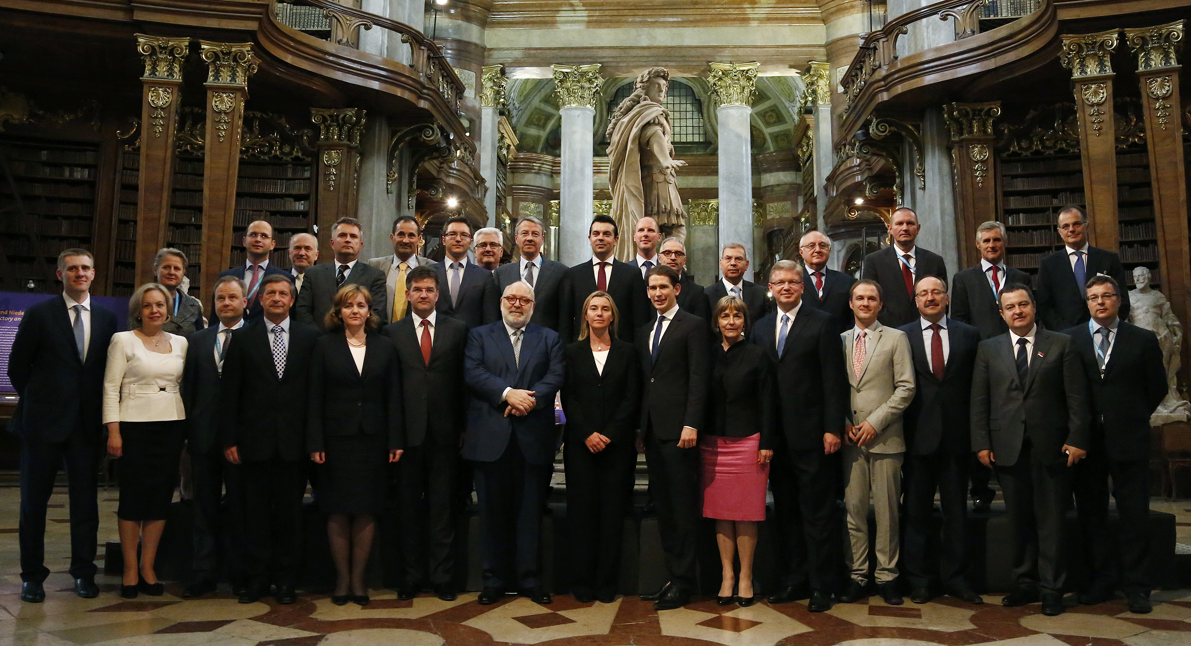 Westbalkankonferenz. Gruppenfoto, Wien, 03.06.2014, Foto: Dragan Tatic